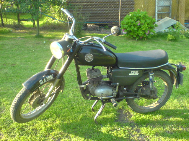 Wspaniały polski motocykl WSK M06B3 do dziś zachowany prawie całkowicie w oryginalnym stanie